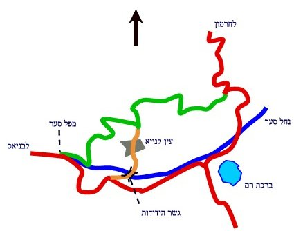 מפה של אזור נחל סער